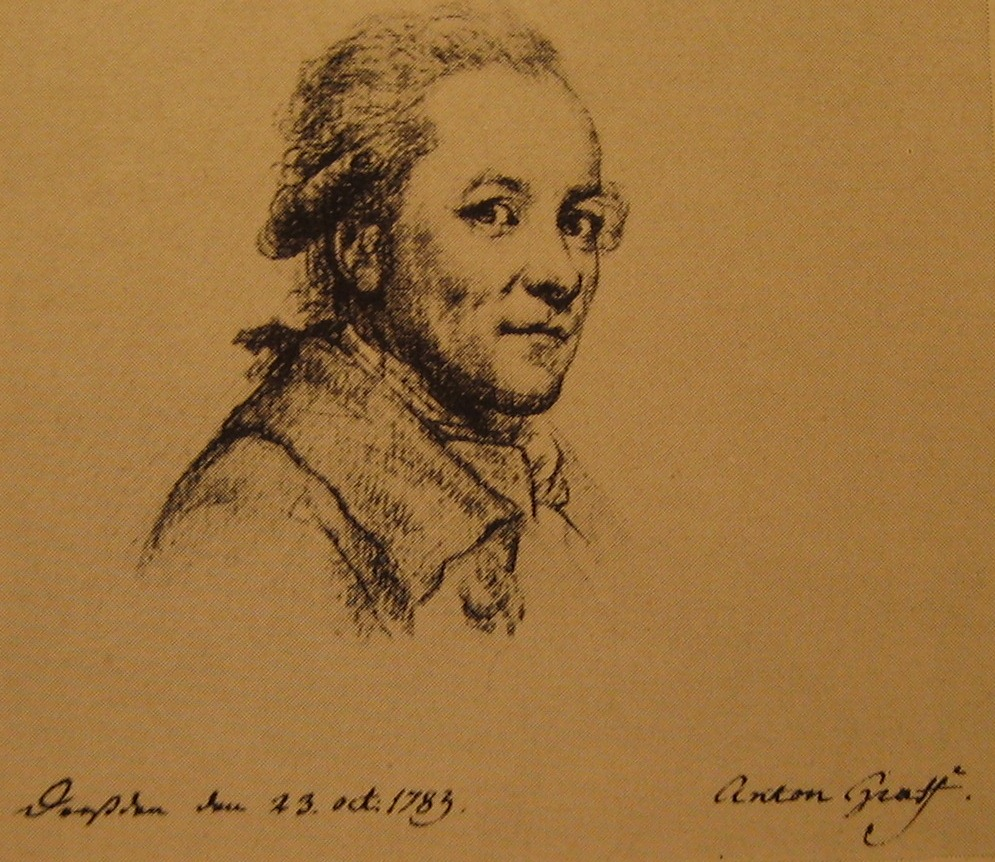 Zeichnung (Kreide, farbig leicht gehöht) Selbstporträt von Anton Graff. Von Anton Graff eigenhändig beschriftet und mit seiner vollen Unterschrift versehen: Dresden den 23. Oct: 1783. Anton Graff